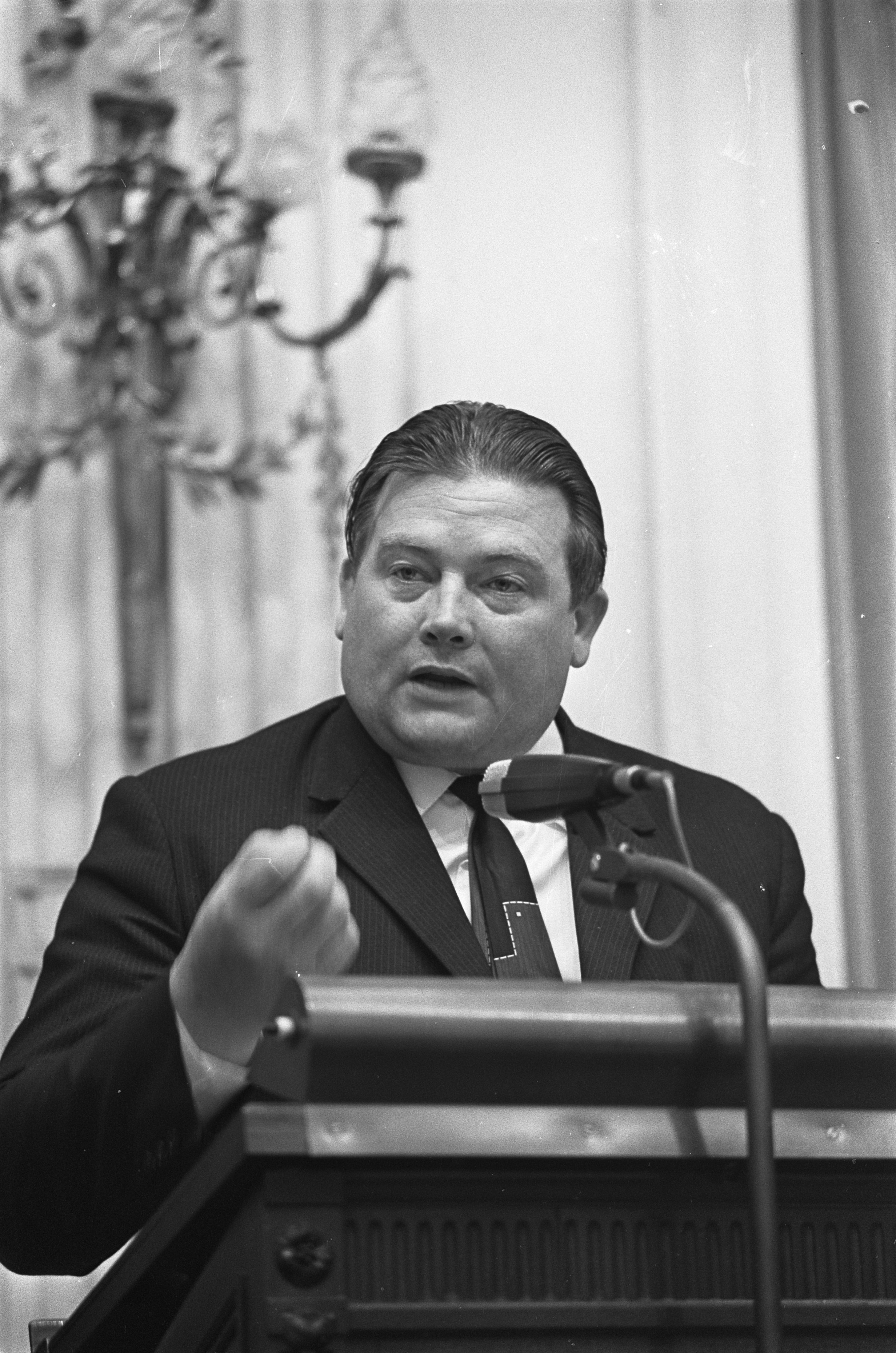 Collectie / Archief : Fotocollectie Anefo Reportage / Serie : [ onbekend ] Beschrijving : Afsplitsing van de Groep-Harmsen van de Boerenpartij; verklaring van kamerlid Harmsen in de Tweede Kamer in Den Haag Datum : 25 juni 1968 Locatie : Den Haag, Zuid-Holland Trefwoorden : parlementariërs, politiek, portretten Persoonsnaam : Harmsen, E.J. Instellingsnaam : Boerenpartij Fotograaf : Nijs, Jac. de / Anefo Auteursrechthebbende : Nationaal Archief Materiaalsoort : Negatief (zwart/wit) Nummer archiefinventaris : bekijk toegang 2.24.01.05 Bestanddeelnummer : 921-4641